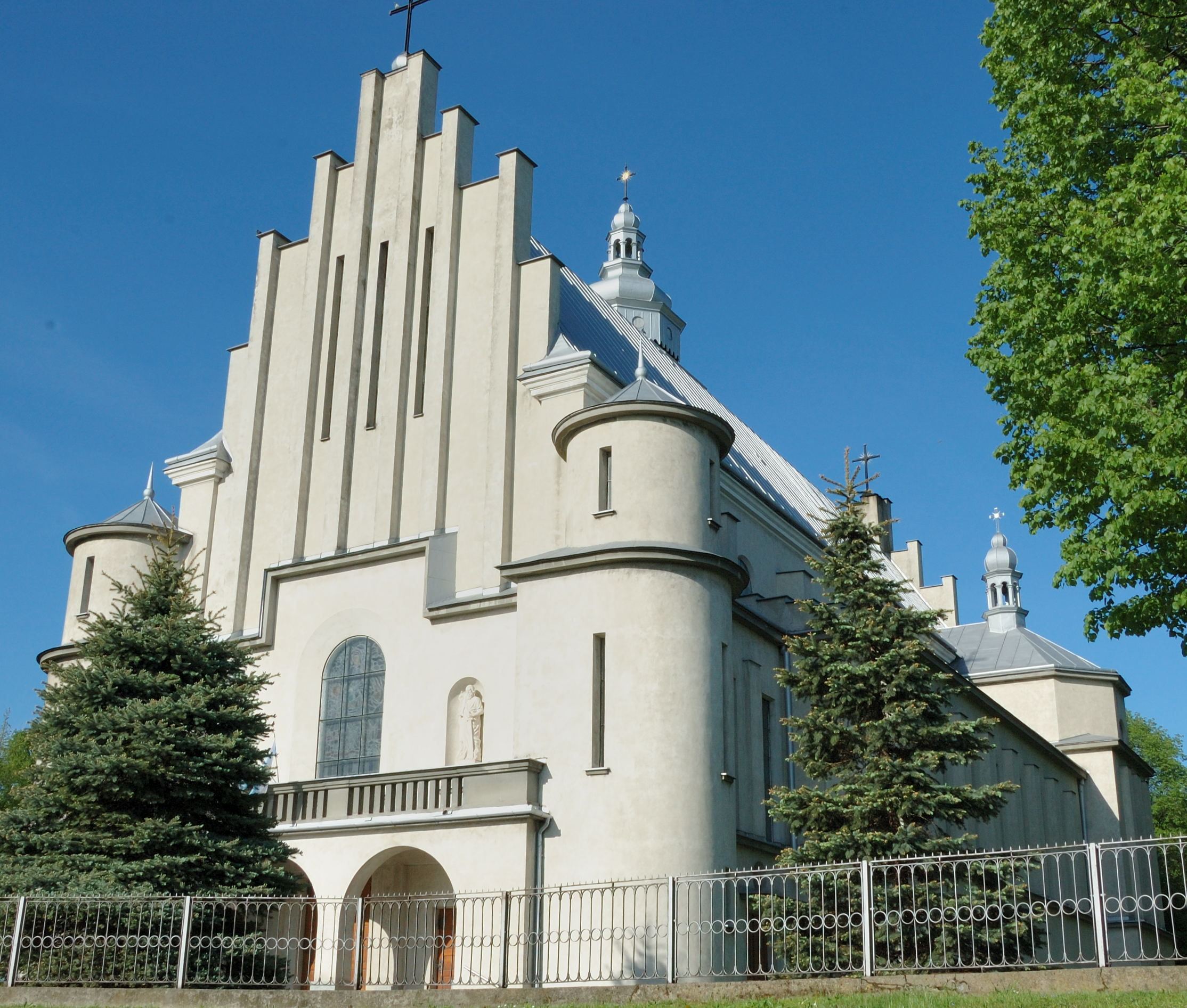 Kościół pw. św. Stanisława, Kosina, front / prawa strona